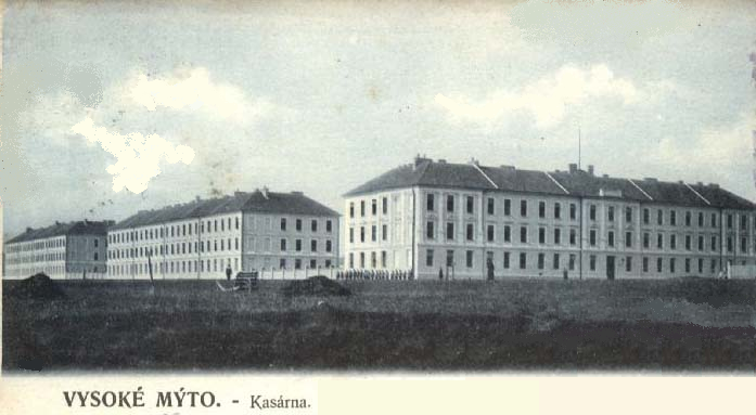 k.u.k. Infanterie-Kaserne in Hohenmaut (Vysoke Myto)